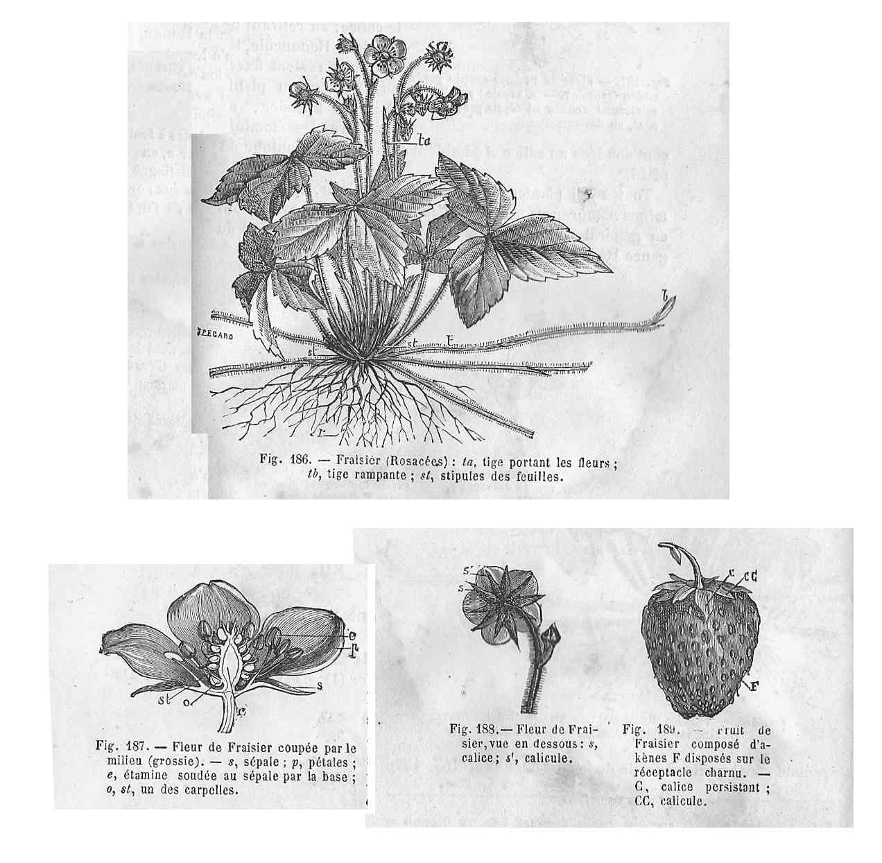 Fraisier ; 4 dessins de plante, fleur & fruit